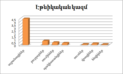 Հունաստանի էթնիկական քարտեզ